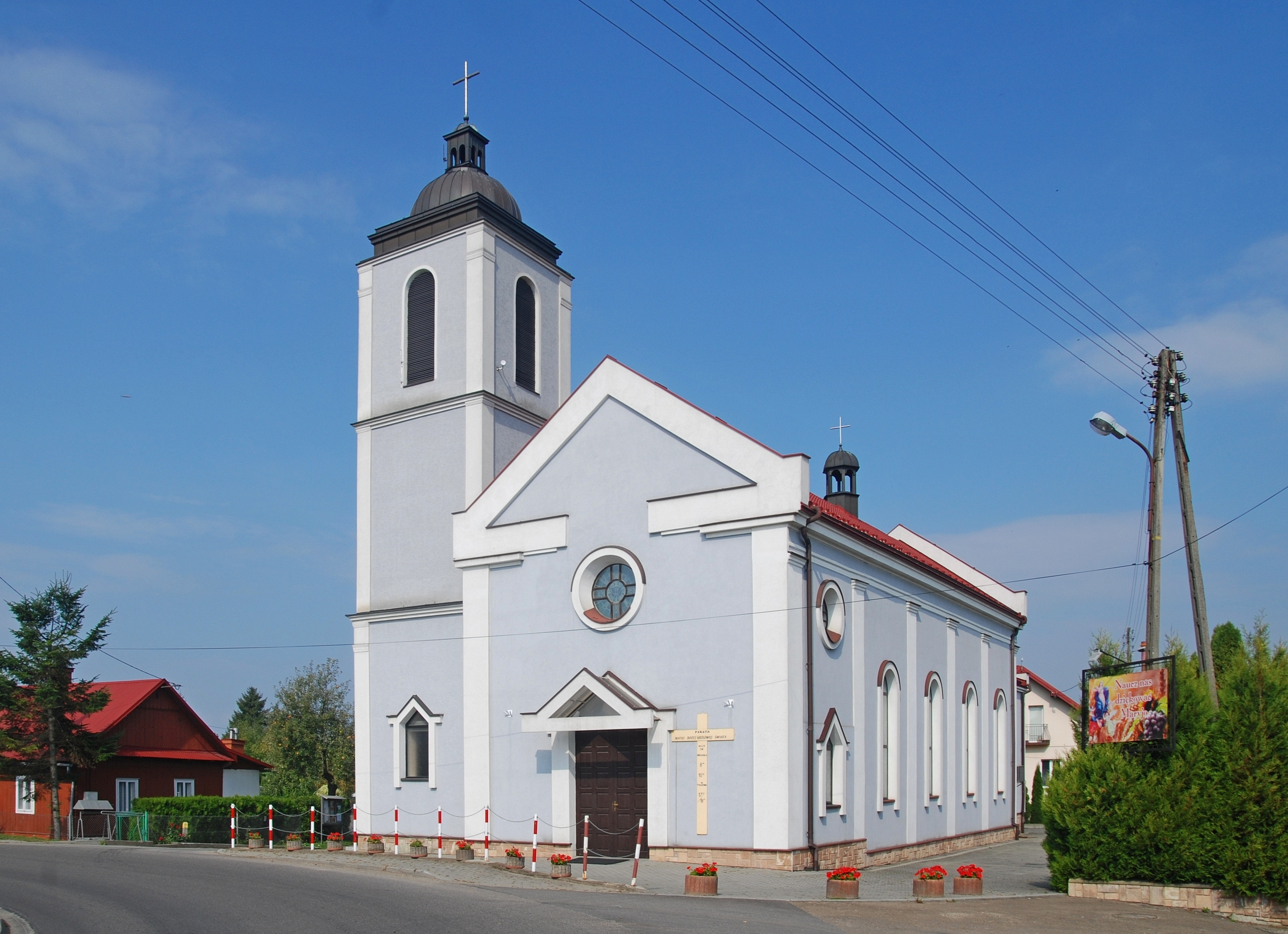 miasto Jasło, ul. Niegłowicka